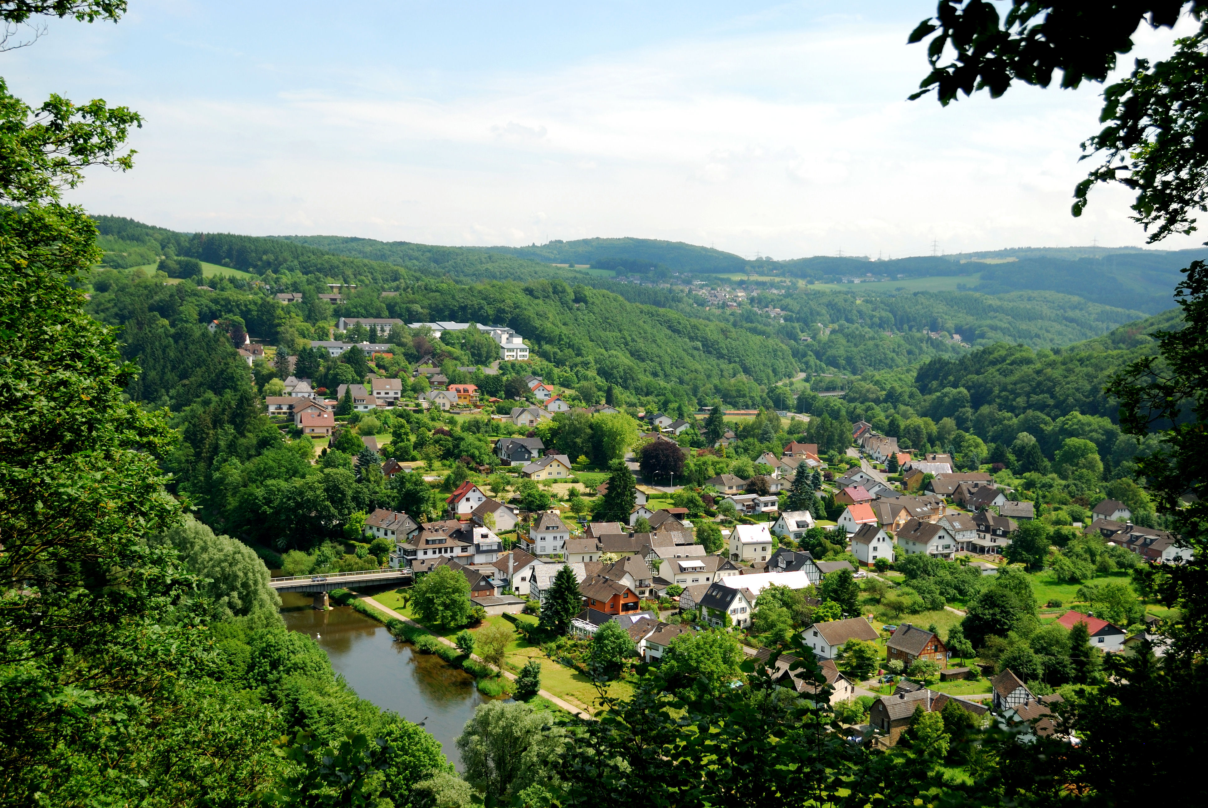 Panorama Herchen, Herchen-Übersehn mit Bodelschwingh-Gymnasium, linke Siegseite